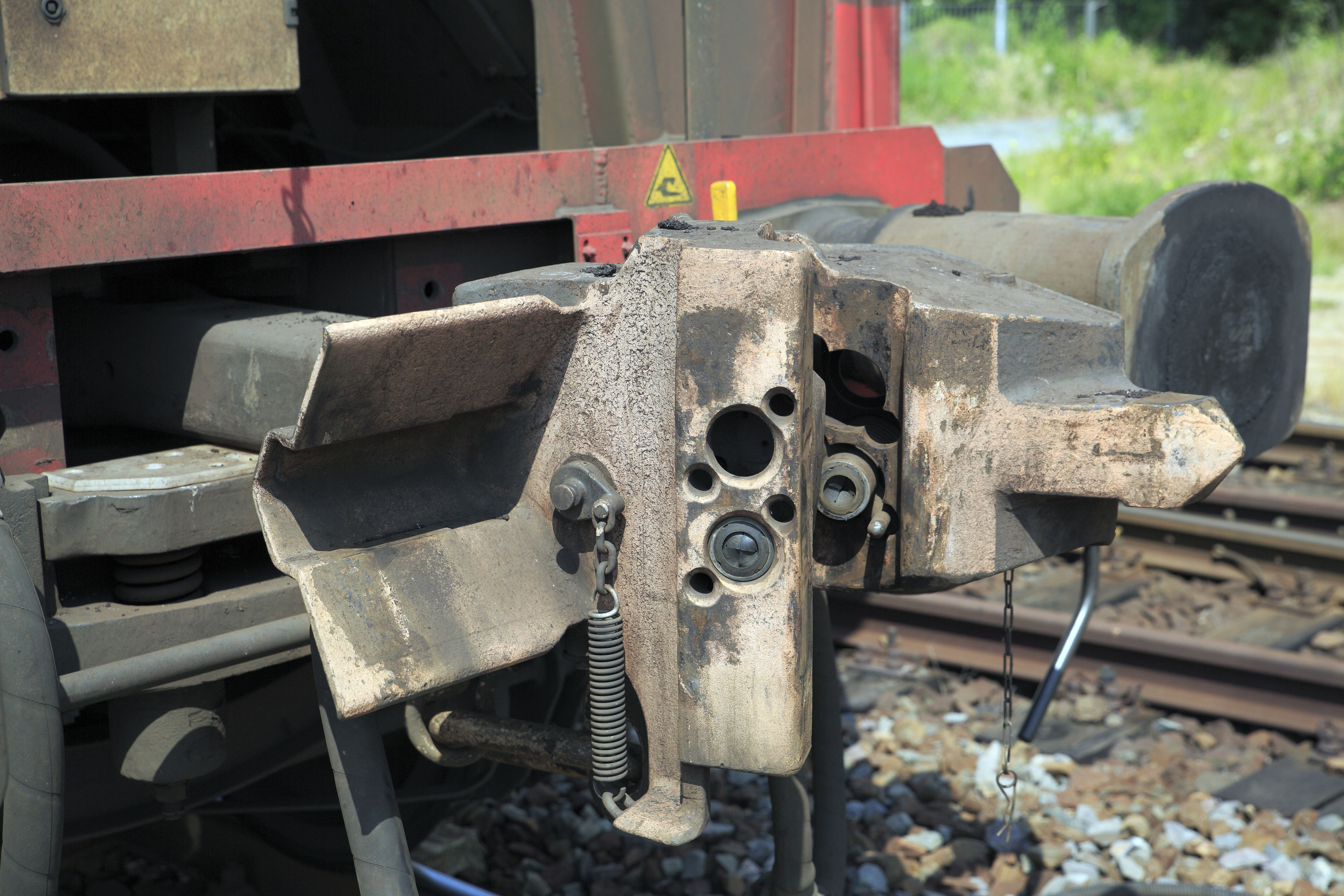 Trichter der Starrmachungsorgane neben dem kleinen Zahn des Willisonprofils und Leitungskupplung. Nur in der unteren Einbaulage ist je eine Luftleitungskupplung eingebaut. Die Starrmachungsorgane sind deutlich niedriger als bei den Kupplungen der Erzwagen, die Kupplungen sind möglicherweise nicht untereinander kuppelbar.